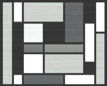 CUADRATS (Homenaje a Mondrian) de Domingo Sarrey primer video-arte generado en Europa en el centro de calculo de la UNIVERSIDAD COMPLUTENSE, MADRID 1968. Fue grabado por TVE, gracias a la colaboración de Enrique Martí Maqueda y Figuerola Ferretti. Sarrey colaboró como programador en dicho centro en los primeros años del seminario de generación automática de formas plásticas, trabajando con ordenadores IBM.